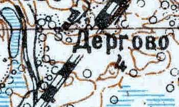 Топографическая карта Ленинградской области, квадрат VIc-28 (Луга), деревня Дёргово